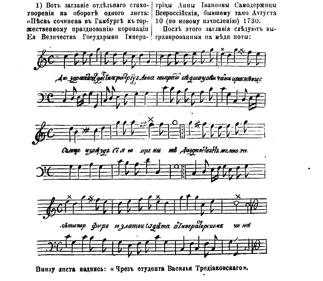 Скан примечания к изданию первой сводной биографии В.К. Тредиаковского